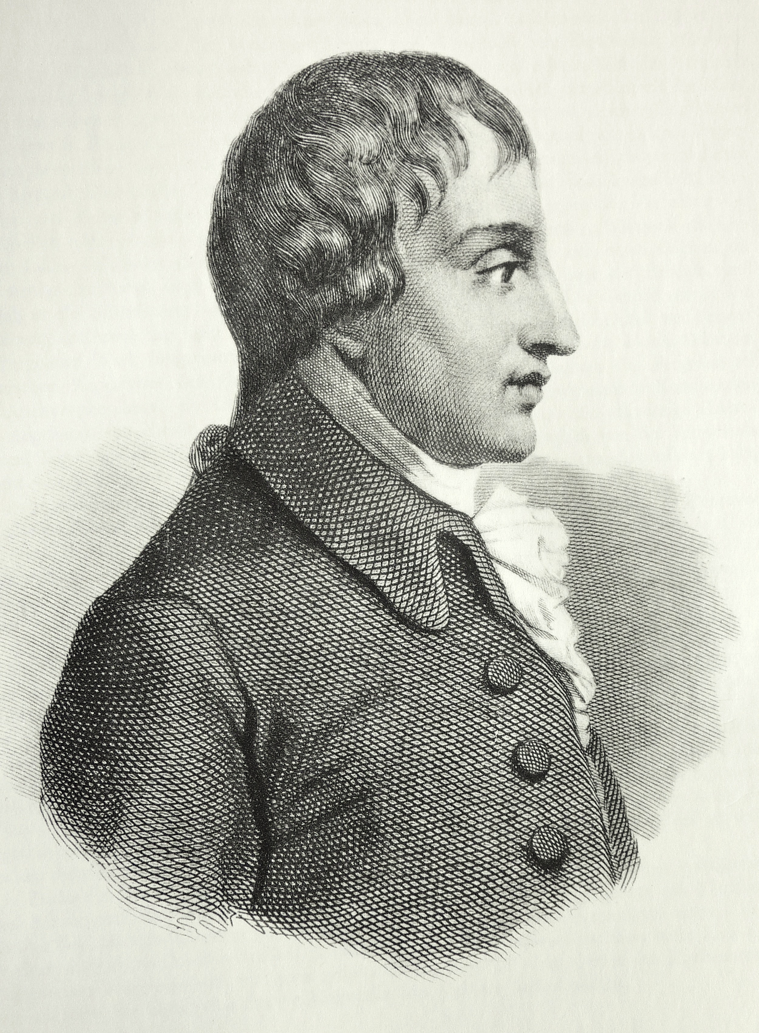 Giovanni Battista Pergolesi, Kupferstich von P. Pirola